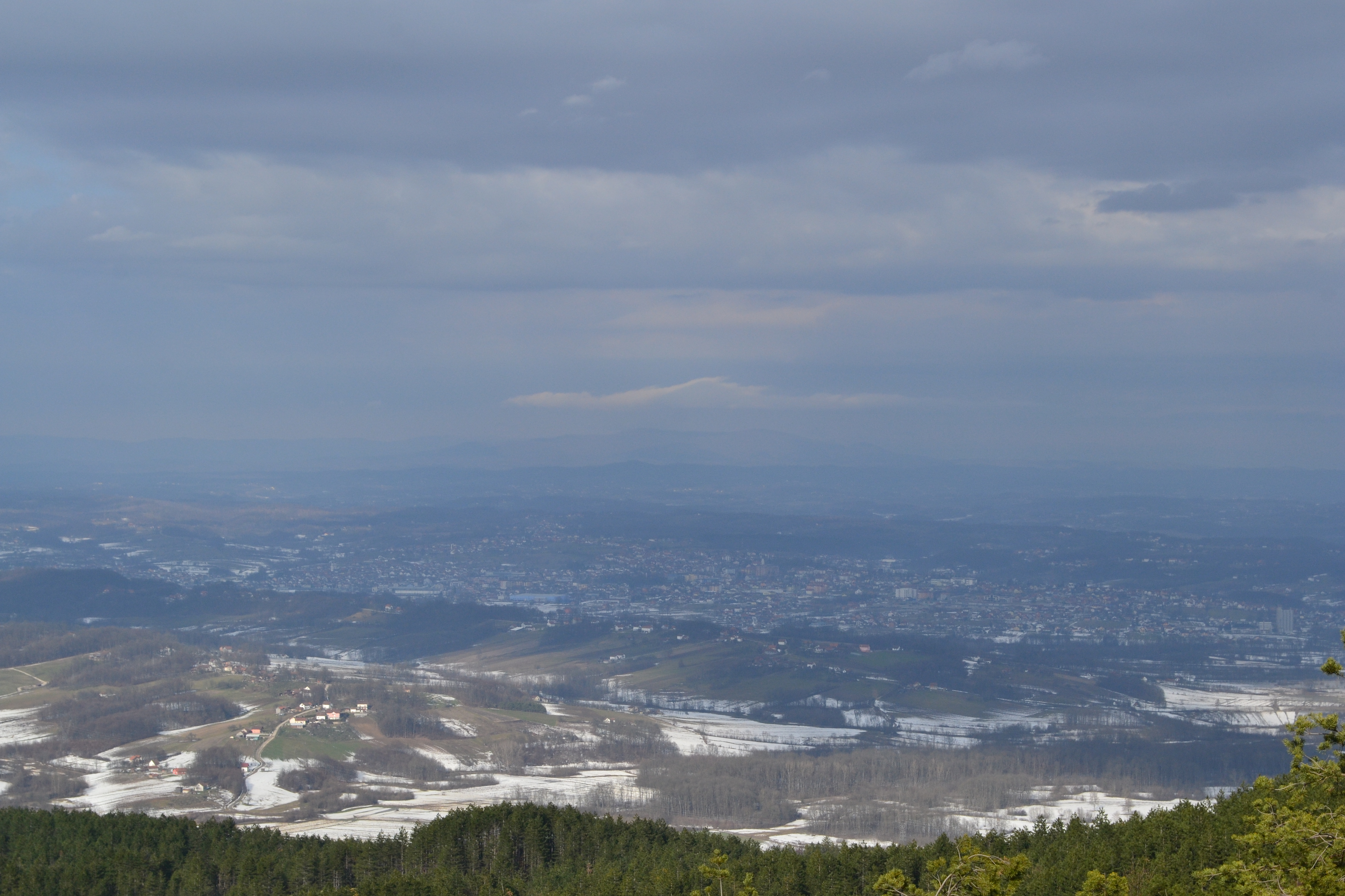 Прњавор са Љубића